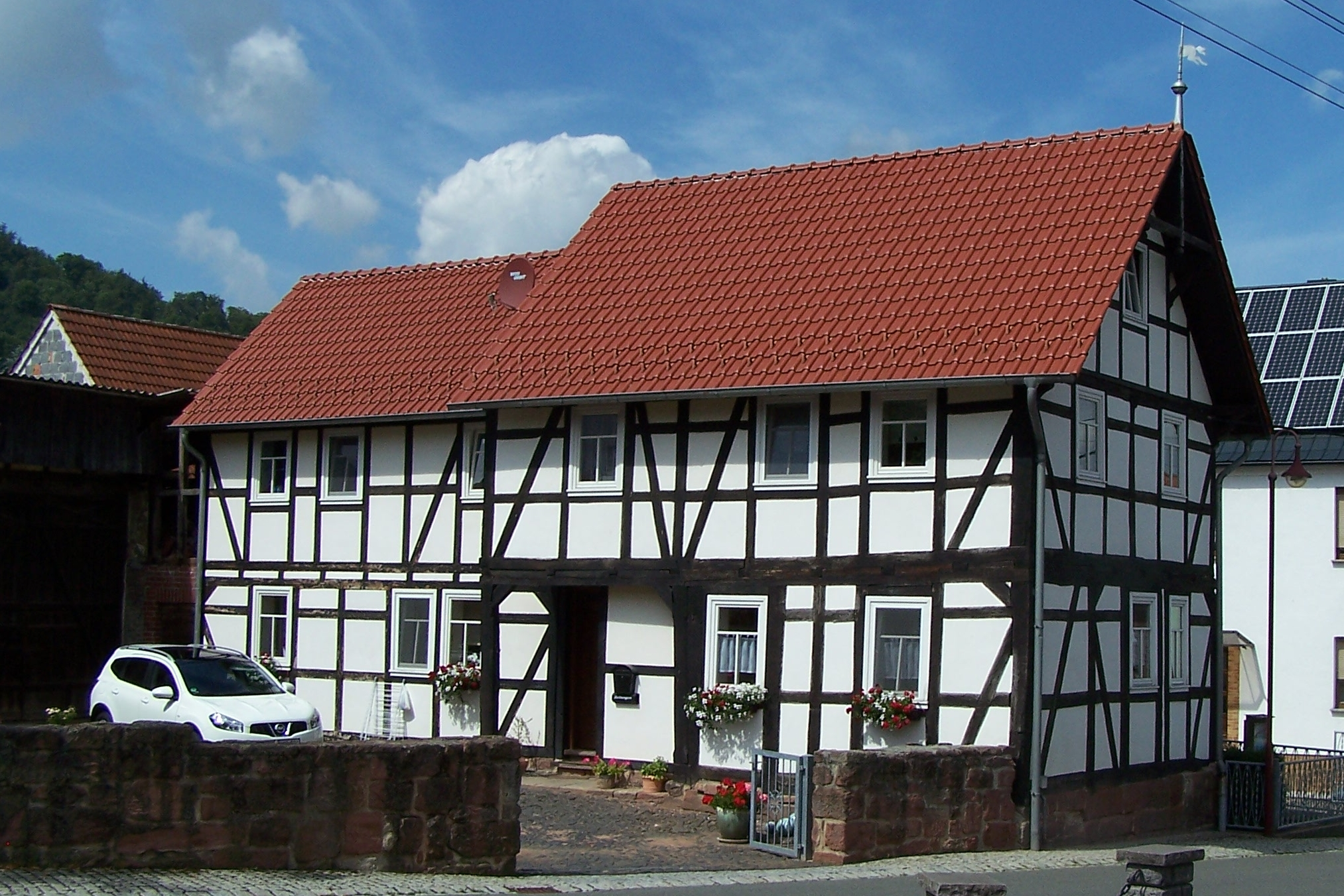 Ansichten, Details und Bauwerke im Ort.